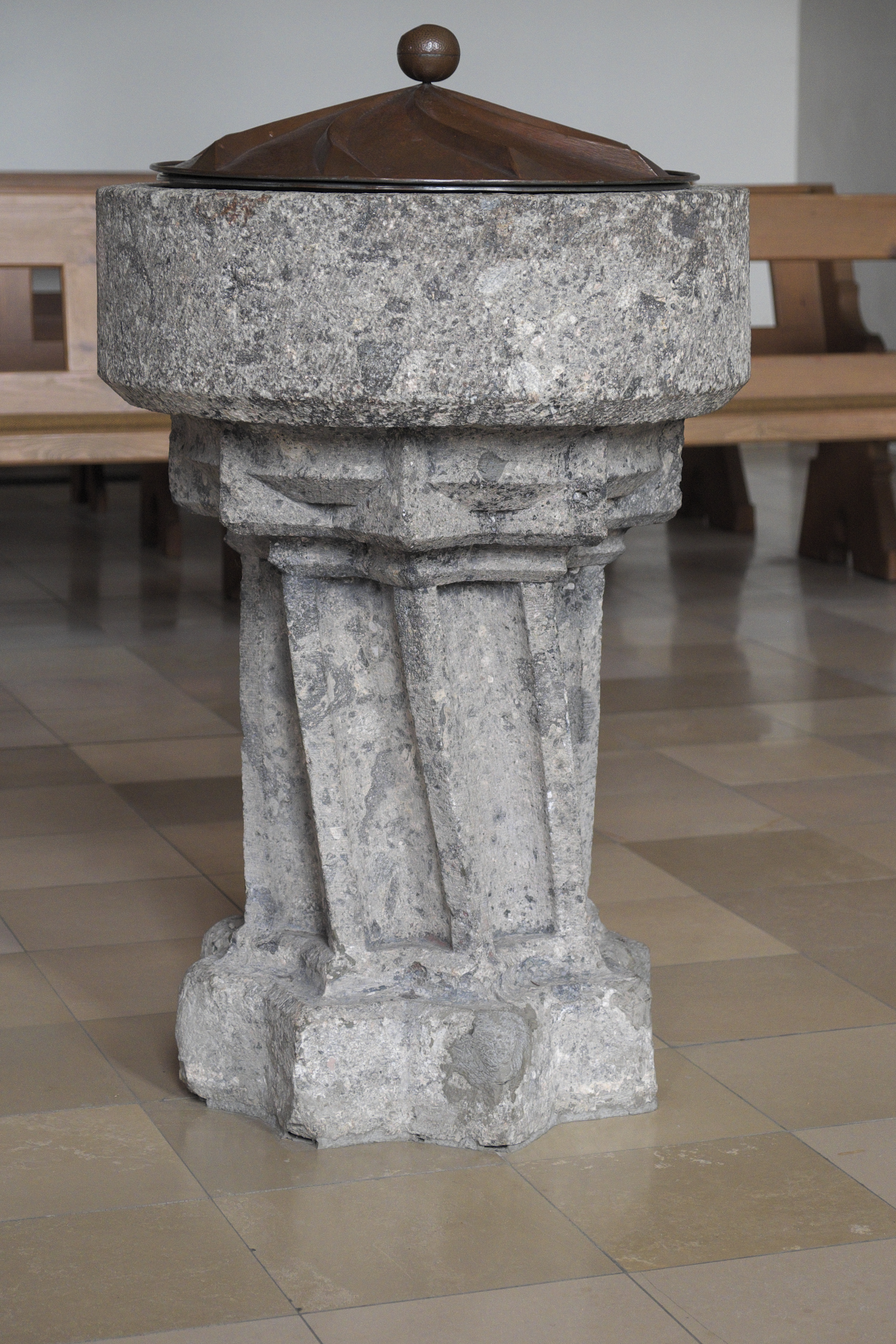 Evangelische Stadtkirche St. Blasius in Bopfingen, einer Stadt im Ostalbkreis (Baden-Württemberg), gotischer Taufstein